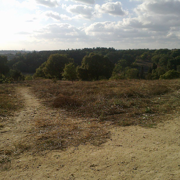 Validebağ Korusu'ndan bir görüntü.